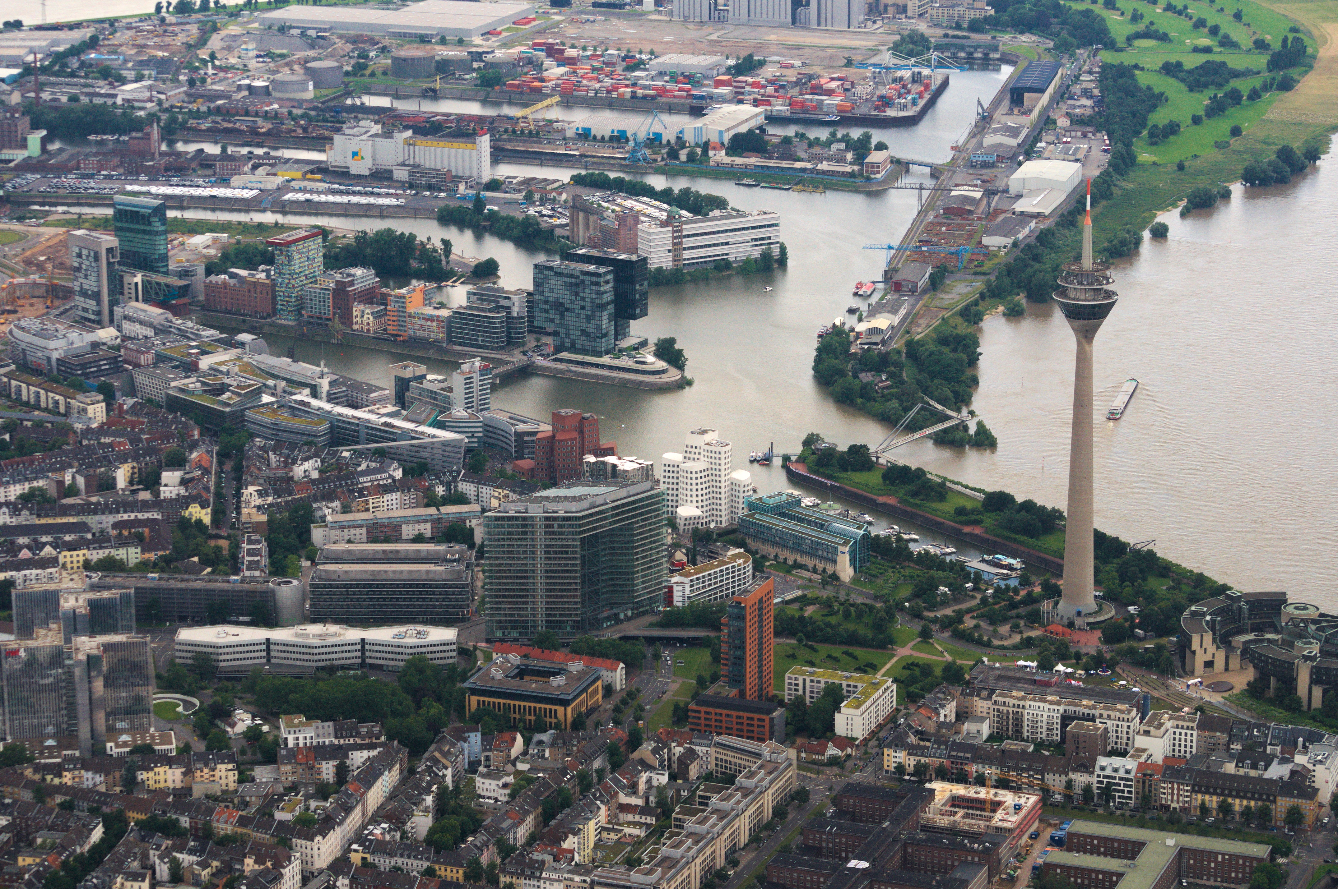 Der Düsseldorfer Hafen; rechts der Rehinturm mit Landtag im Anschnitt; In der Mitte dass Hochhaus "Stadttor"; rechts und ganz oben links der Rhein; Aufnahme von Nordosten; Luftbild aus ca. 600m Höhe über Grund